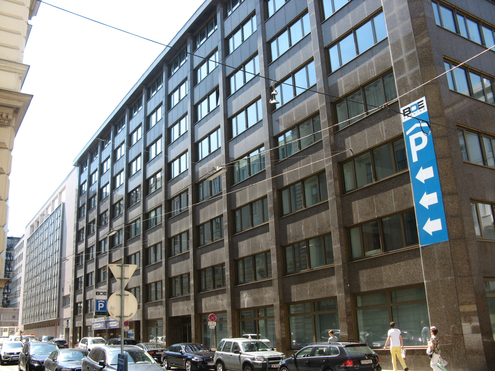 Amtsgebäude (1975) von Karl Köfer, Cobdengasse 2, Wien-Innere Stadt